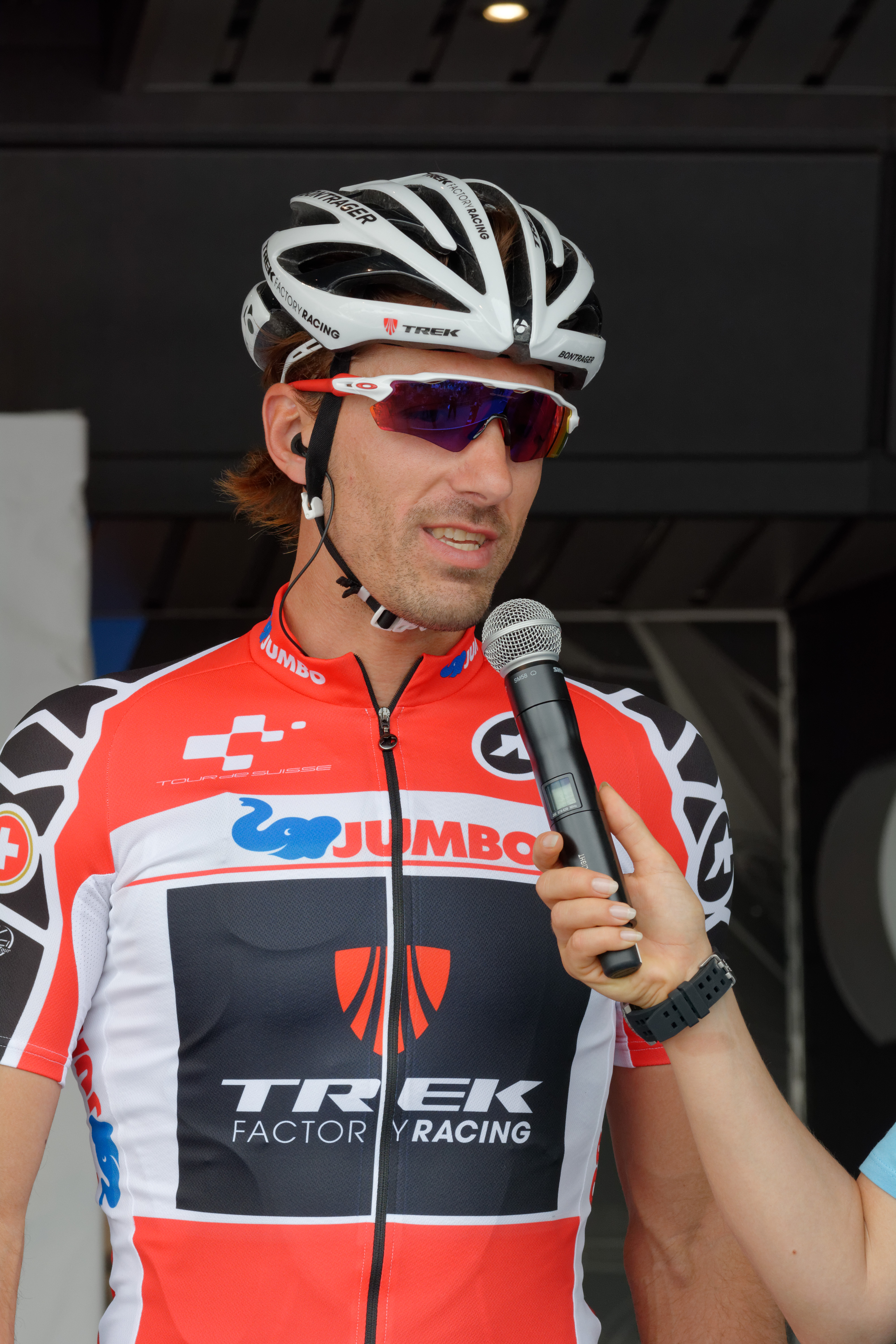 D71_0041_DxO